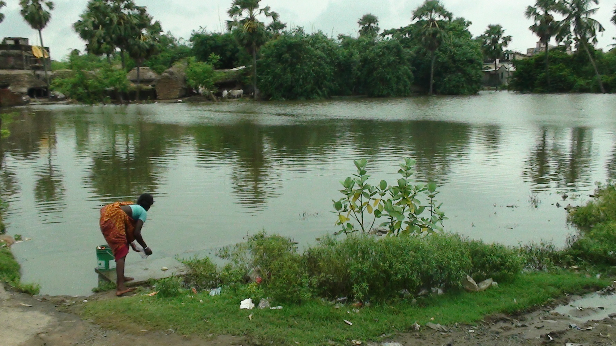 குளத்தங்கரையில் அழுக்குகளைத் தேய்த்தெடுக்கும் ஓர் பெண்.